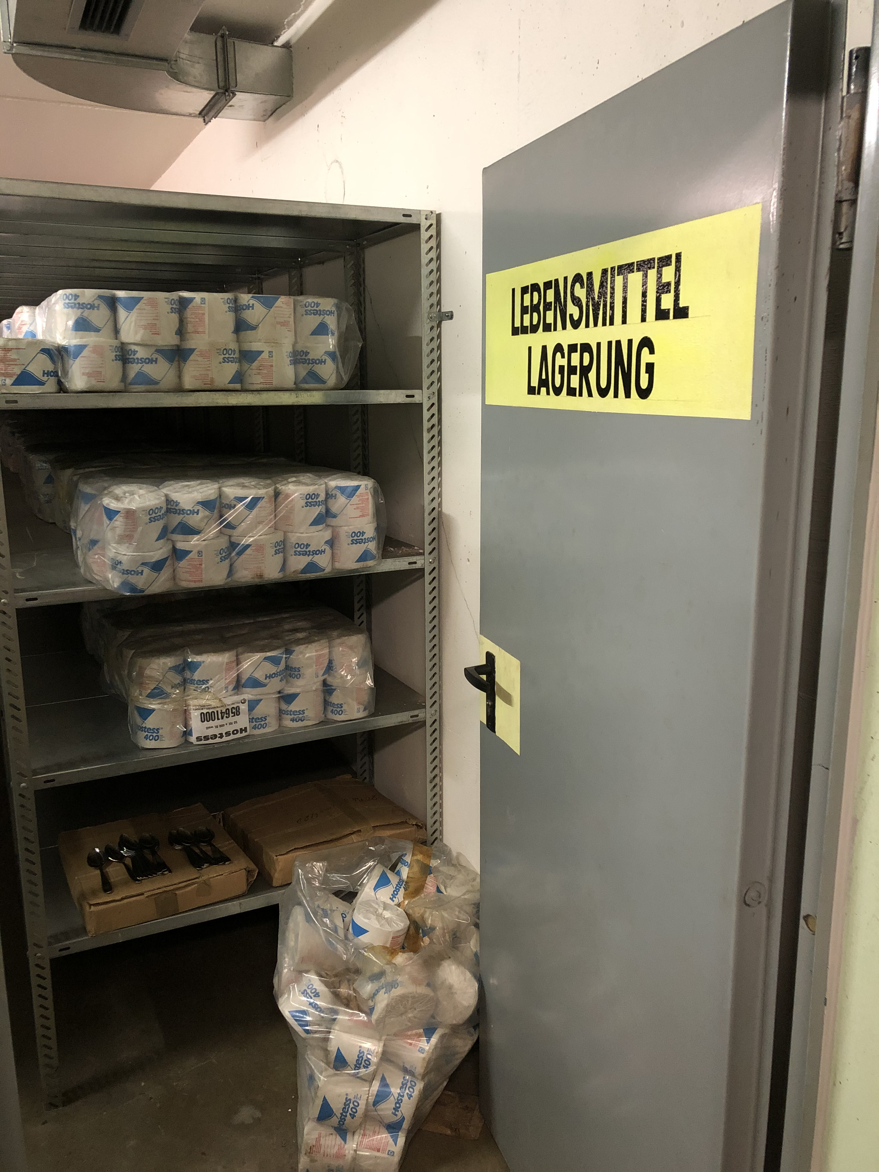 Mehrzweckanlage Sedanplatz Lebensmittellagerung